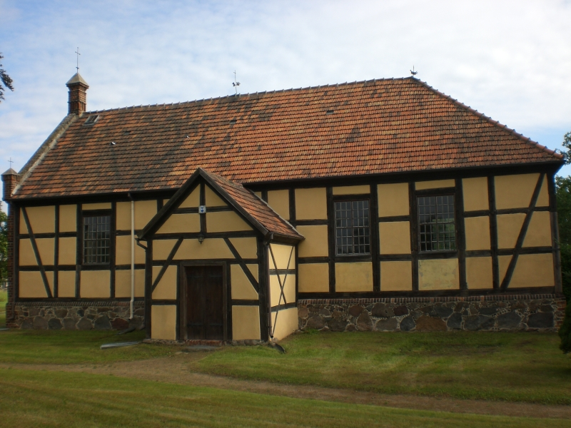 Fachwerkkirche, errichtet 1818